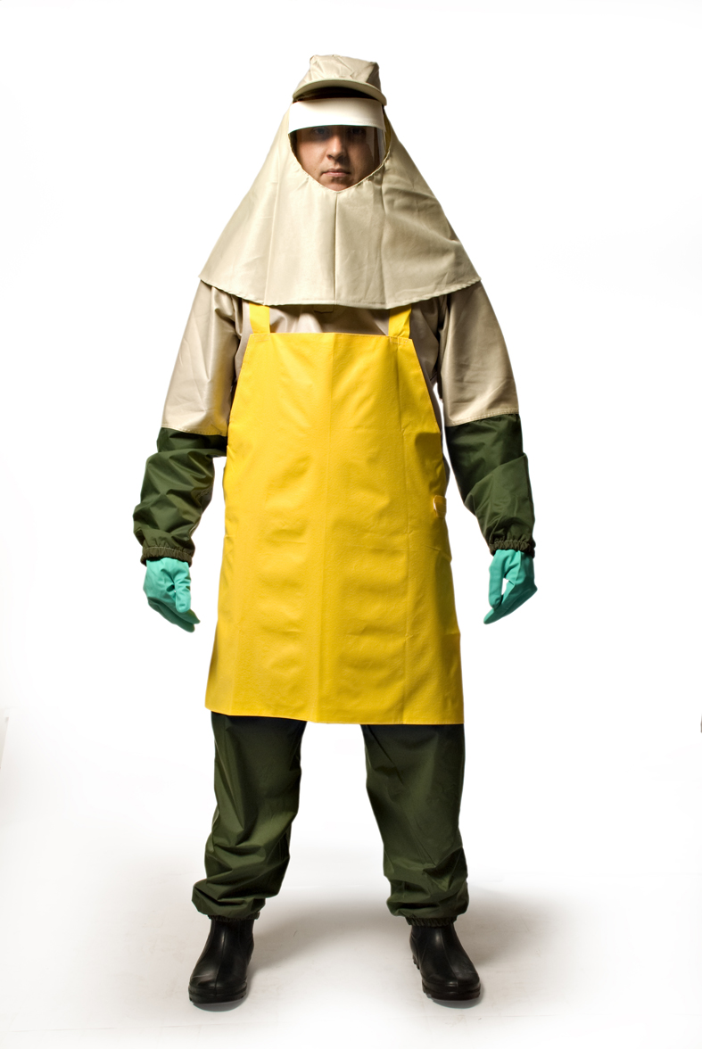 Best quality Personal Protective Equipment for agriculture